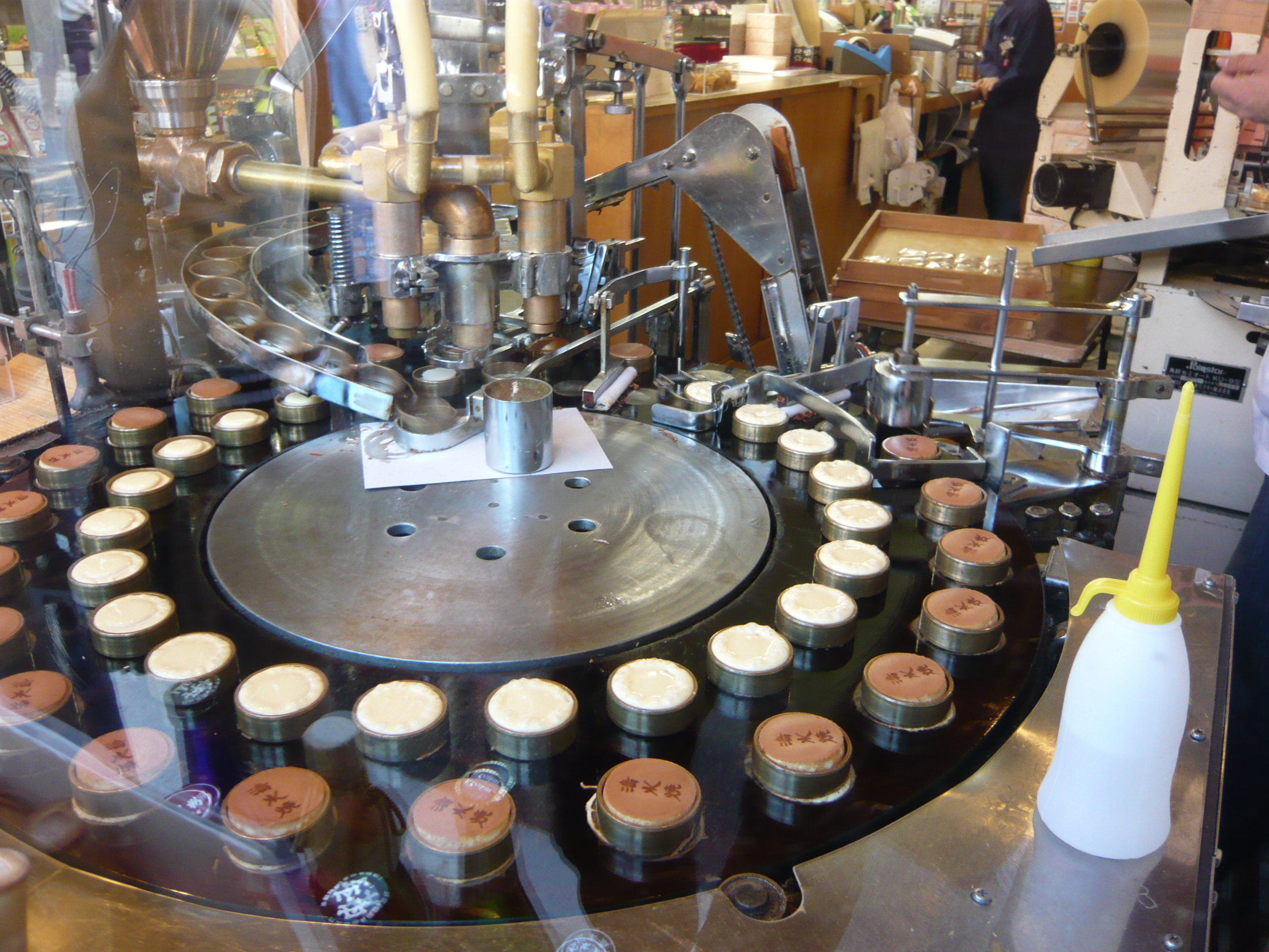 清水焼 [1] [2]